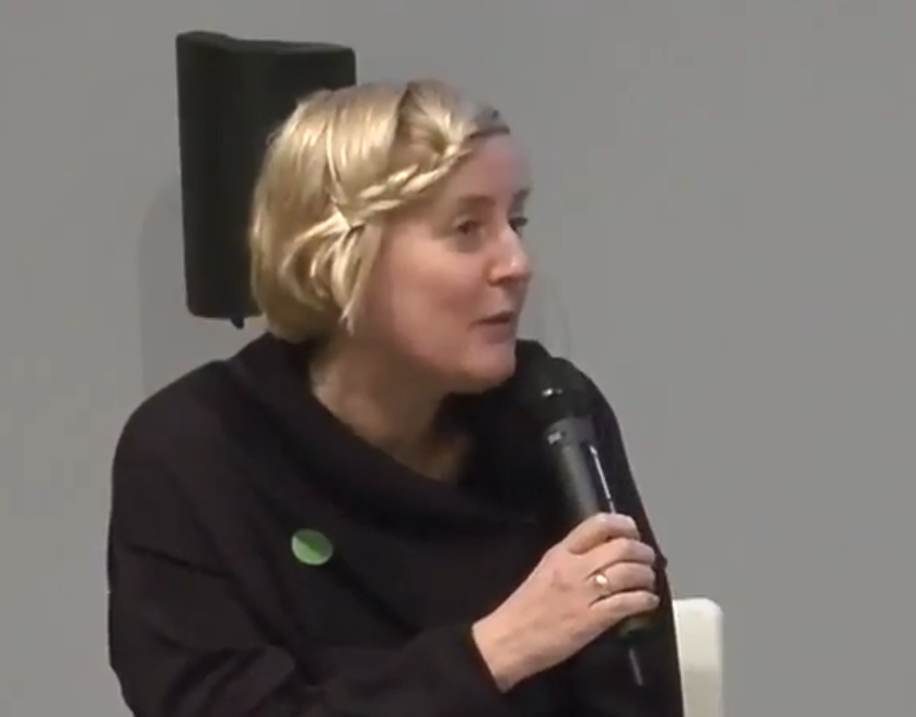 Jeanne van Heeswijk, 2013